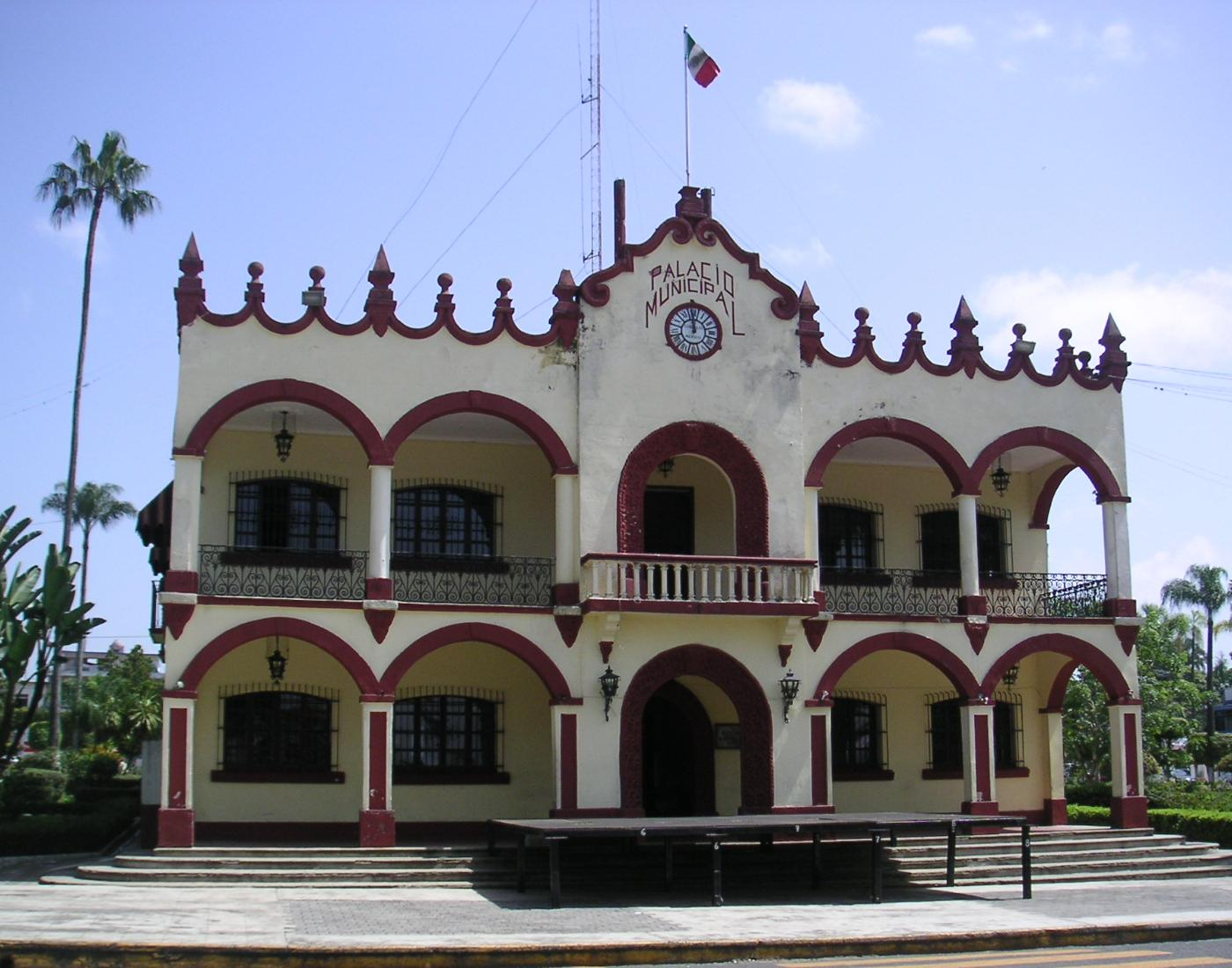 Palacio Municipal, Fortín de las Flores, Veracruz